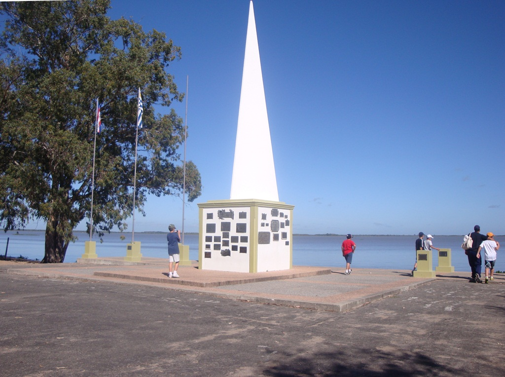 Obelisco en la Playa de la Agraciada. Conmemora el desembarco de los Treinta y Tres Orientales.